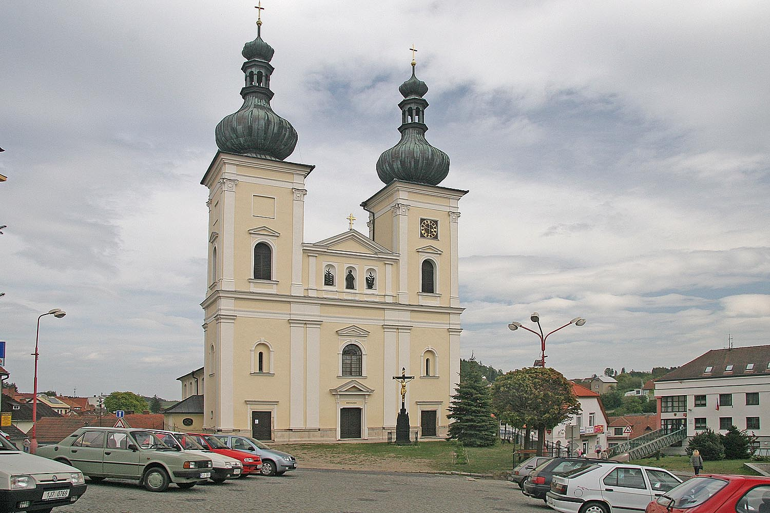 Bystřice nad Pernštejnem - kostel svatého Vavřince, district Žďár nad Sázavou